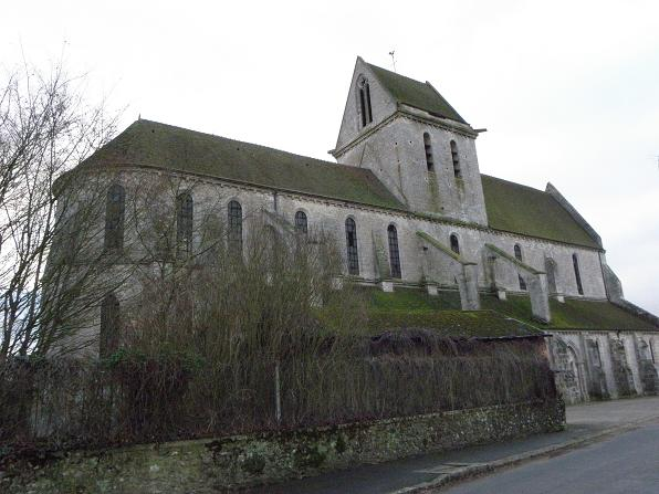 Vue septentrionale de l'église priorale Notre-Dame de l'Assomption de Voulton (77).